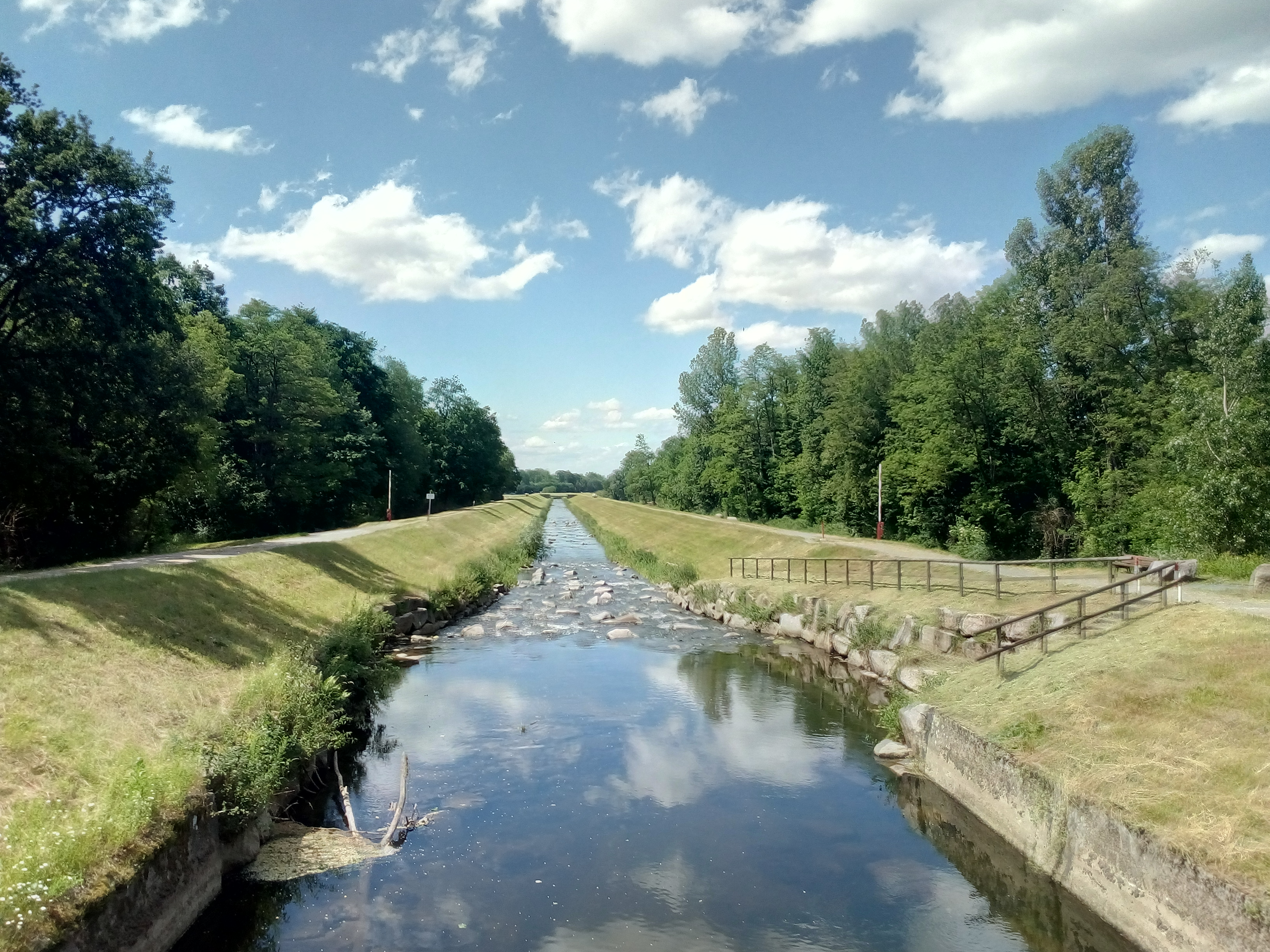 Sandbach, Sohlgleite am Abzweig des Mühlbachs, Gemeinde Iffezheim